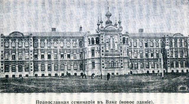 Новая семинария в Ваке, Тифлис